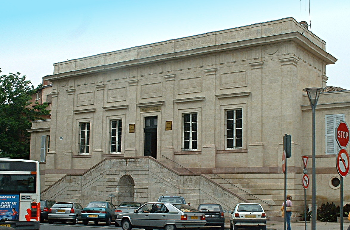 Palais de Justice d'Albi (Tarn, France).